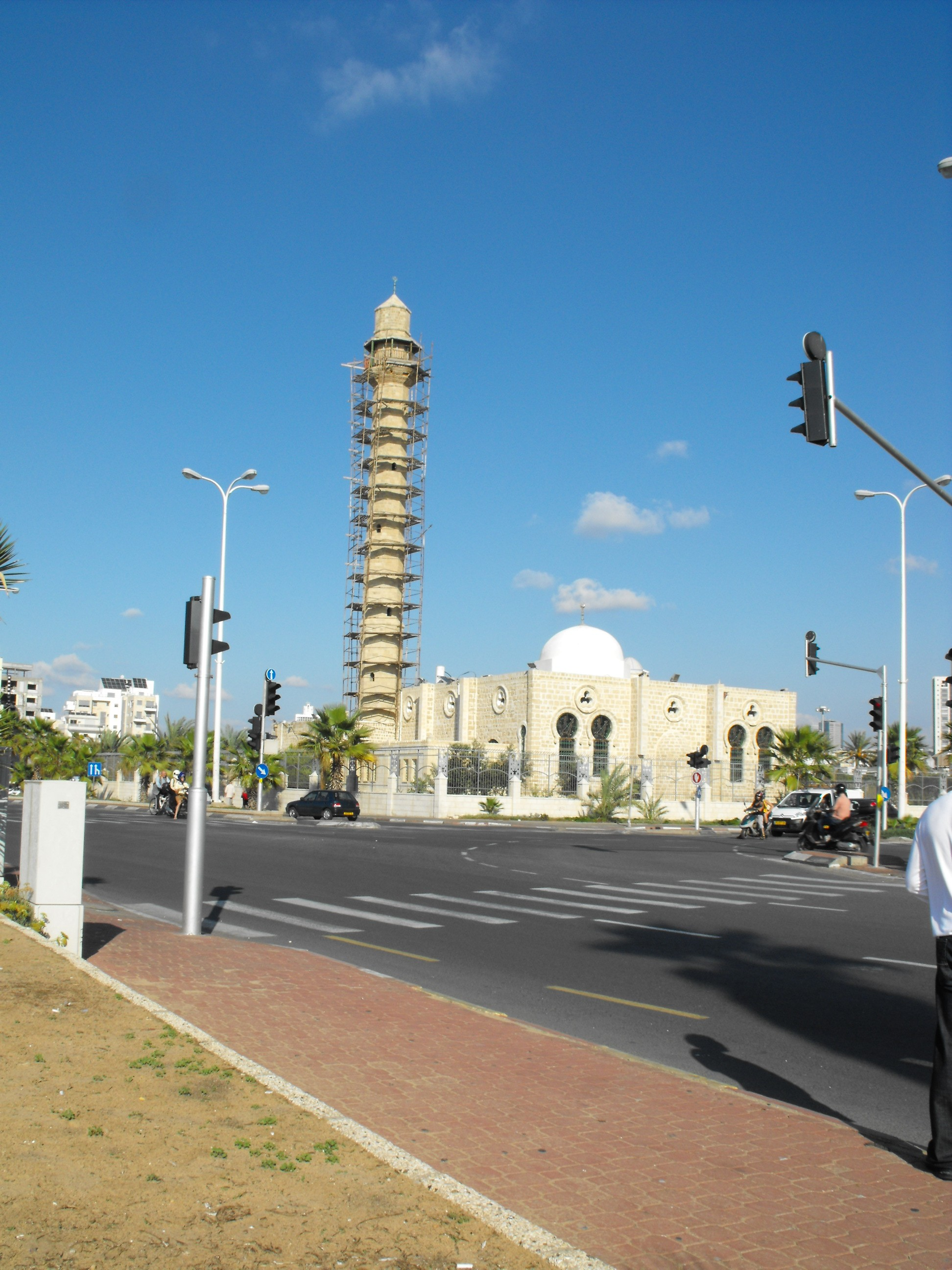 Tel Aviv, a Mosque, Oct.,2008 Tel Aviv-Yafo